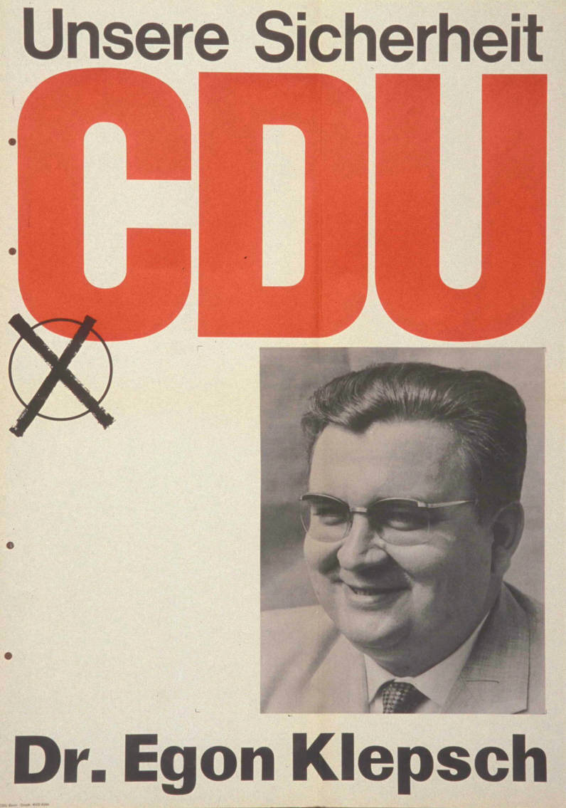 Unsere Sicherheit CDU Dr. Egon Klepsch Abbildung: Porträtfoto - Stimmkreuz Plakatart: Kandidaten-/Personenplakat mit Porträt Auftraggeber: CDU Bonn Drucker_Druckart_Druckort: KVD Köln Objekt-Signatur: 10-001: 1264 Bestand: Plakate zu Bundestagswahlen (10-001) GliederungBestand10-18: Plakate zu Bundestagswahlen (10-001) » Die 5. Bundestagswahl am 19. September 1965 » CDU » Mit Porträtfoto Lizenz: KAS/ACDP 10-001: 1264 CC-BY-SA 3.0 DE